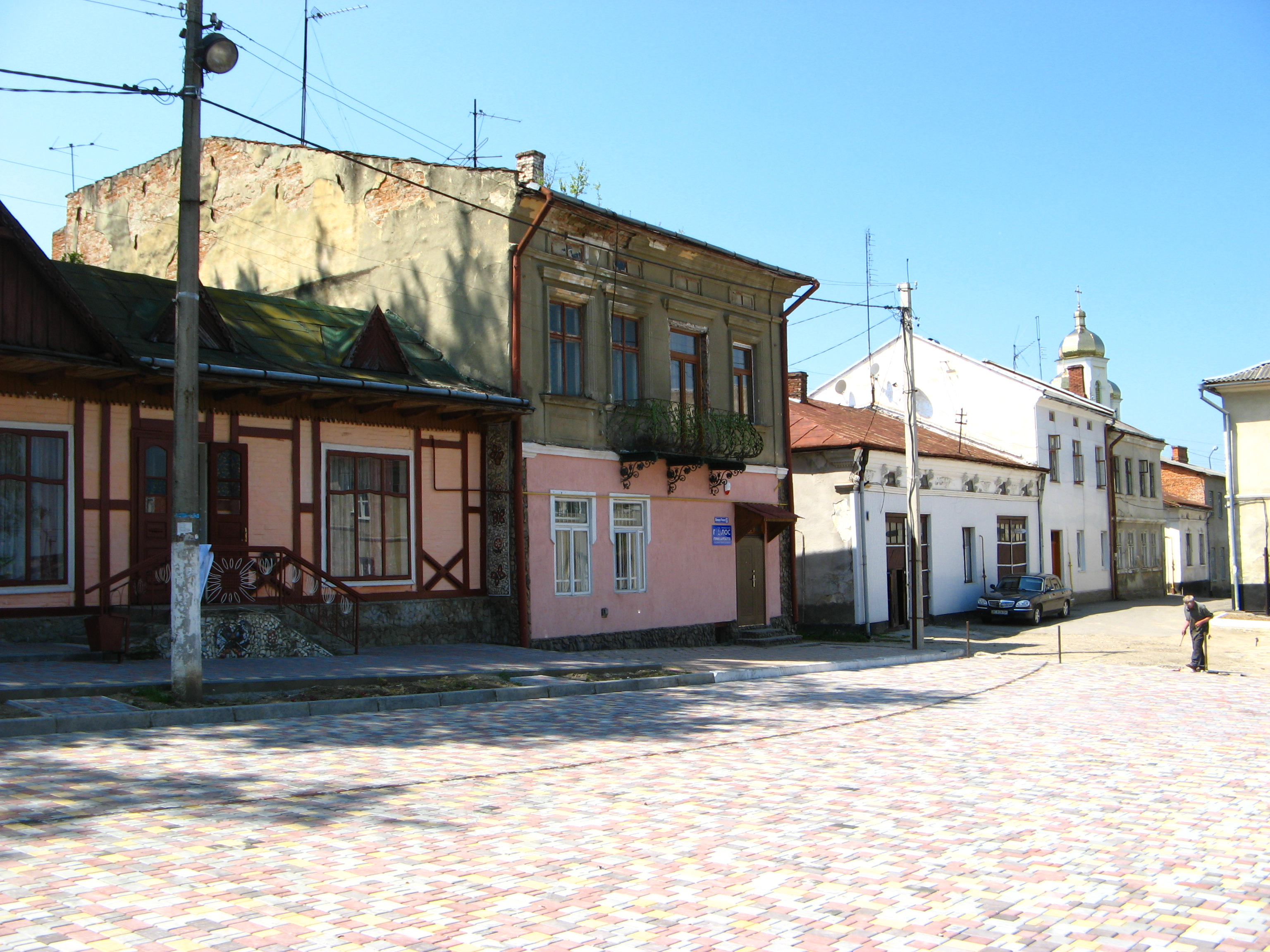 Старий Самбір (Львівська область).